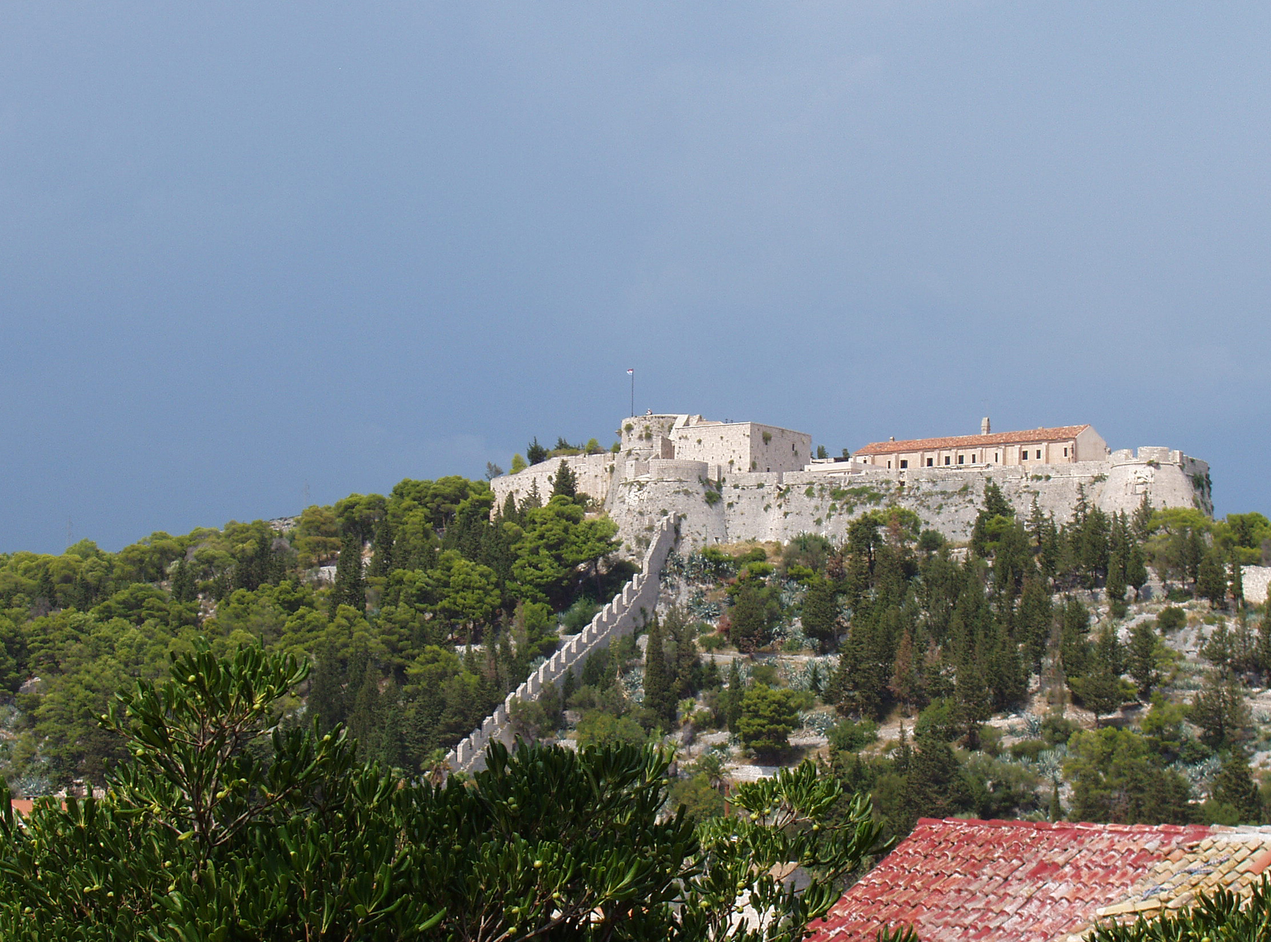 Antiche mura della città di Hvar risalenti al XII secolo